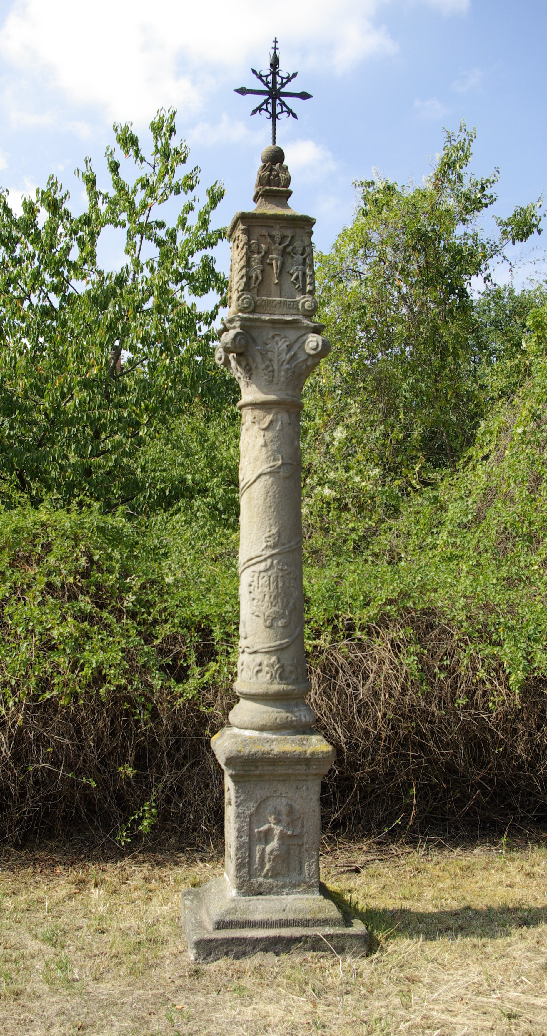 Nützelmarter im Erlanger Stadtteil Kosbach.